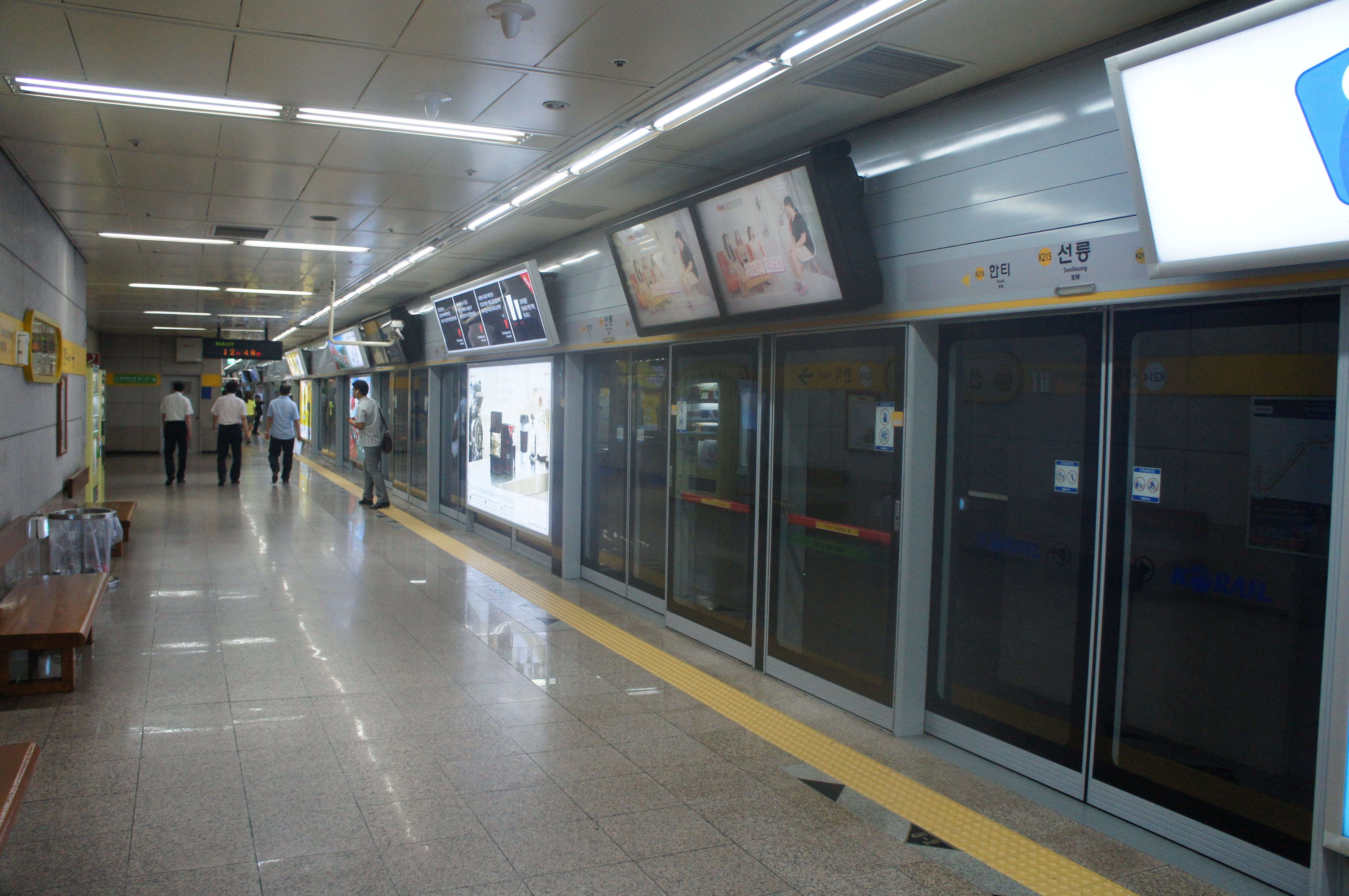 분당선 선릉역 승강장